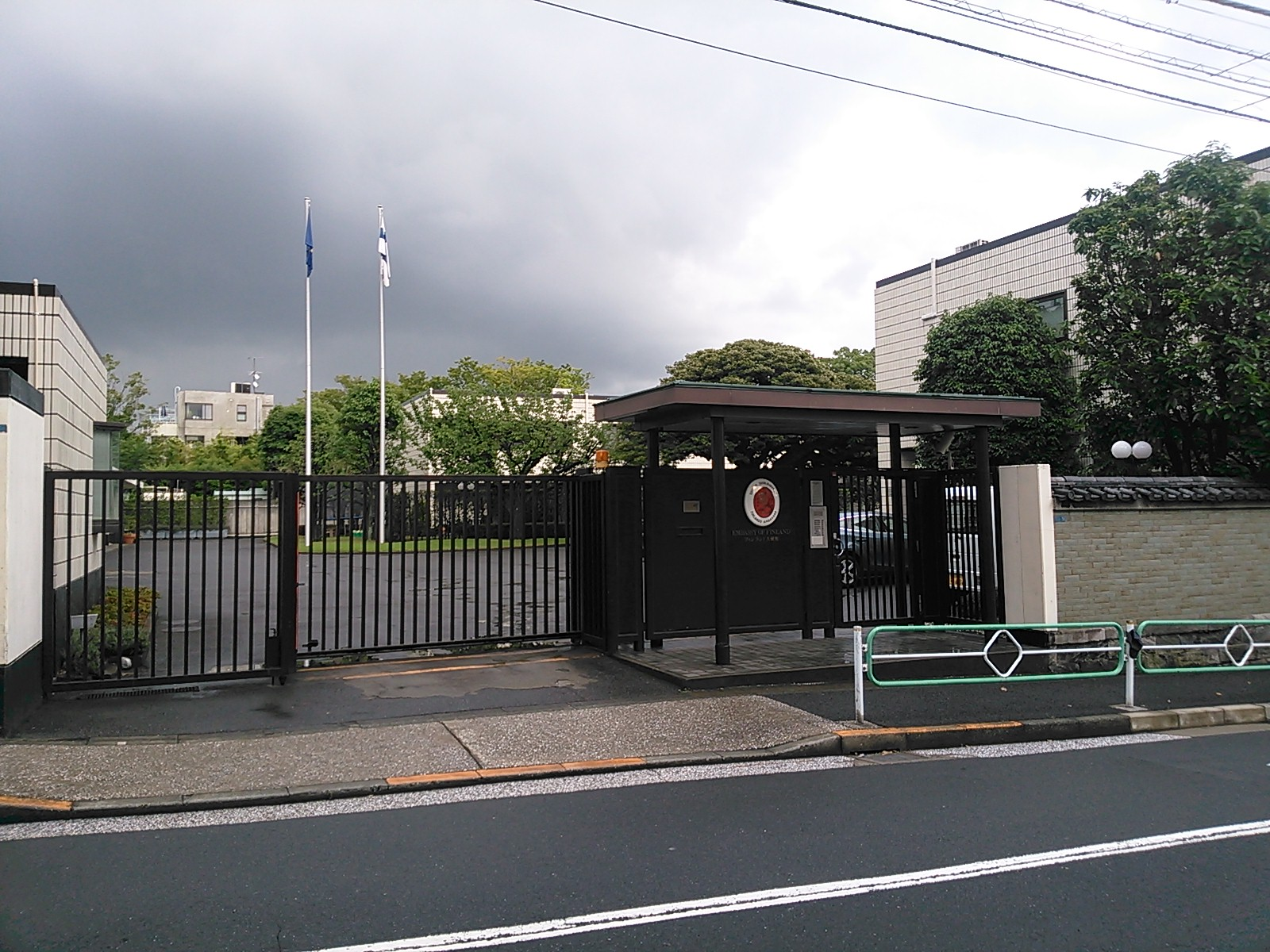 東京都港区南麻布、駐日フィンランド大使館